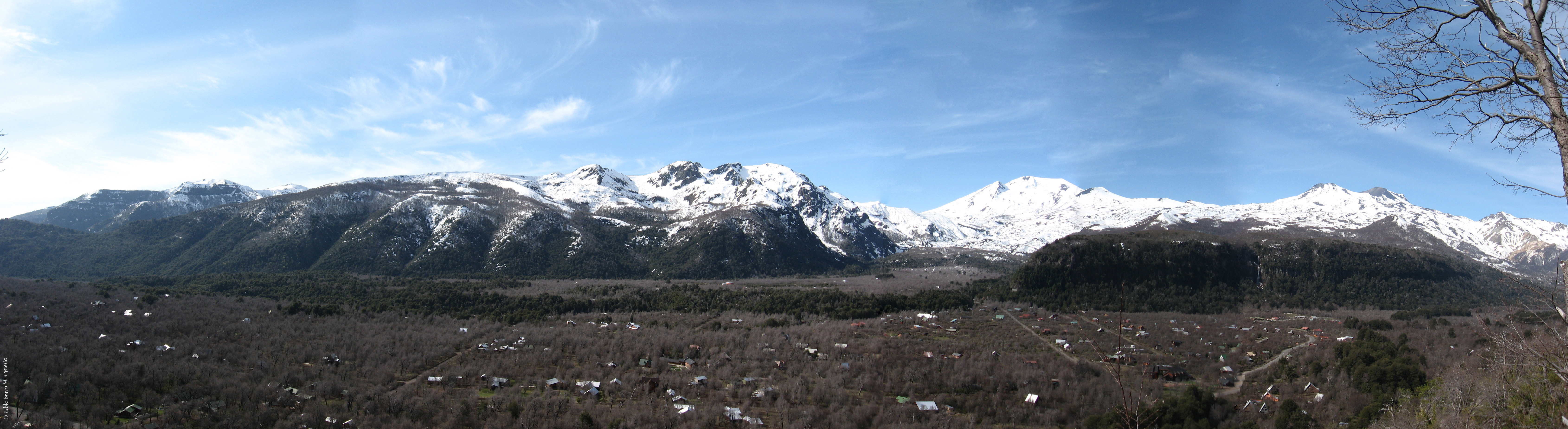 Valle Las Trancas, Región del Bío-Bío, Chile.